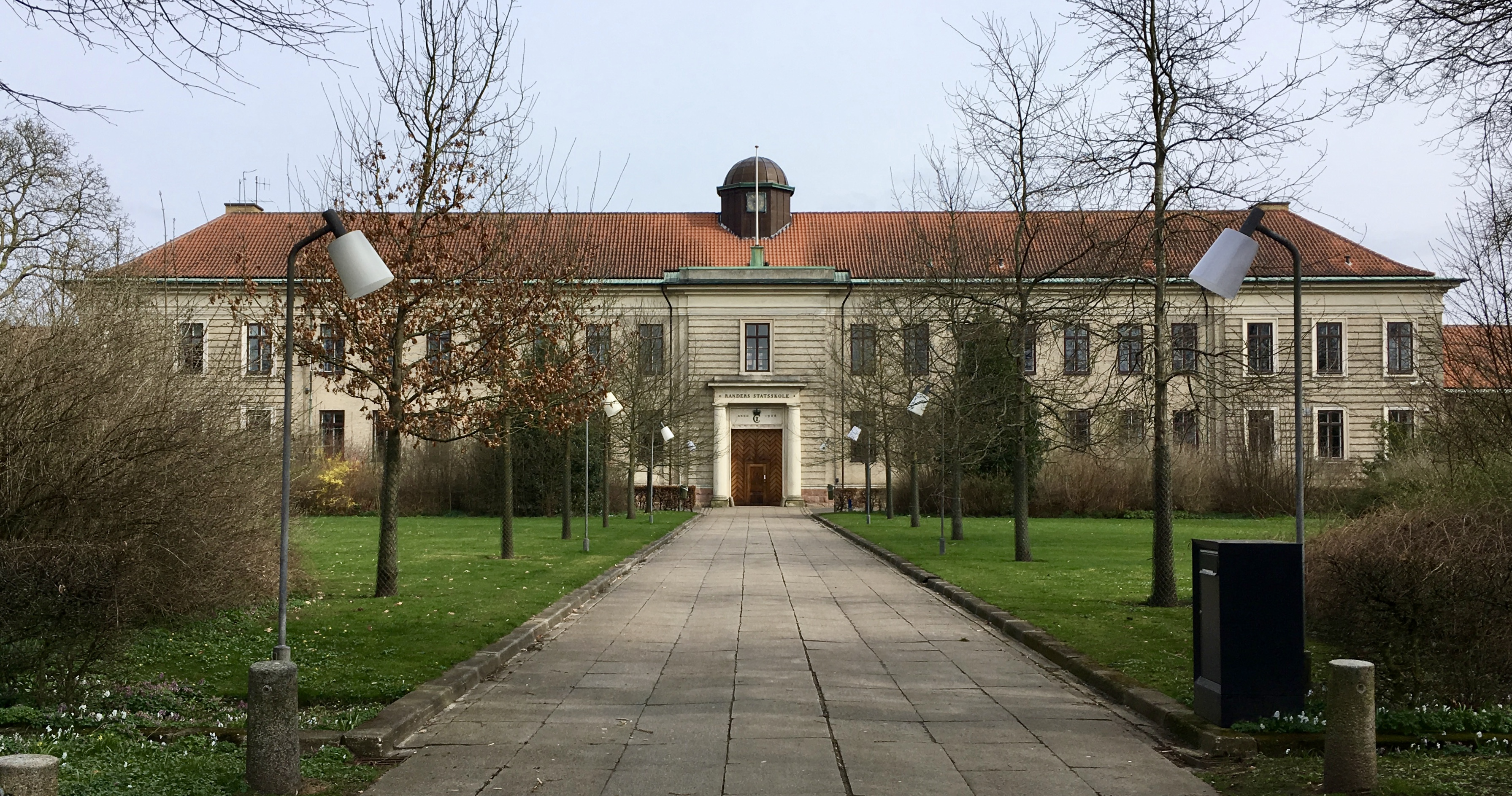 Randers Statsskole's fredede bygning fra 1926, tegnet af Hack Kampmann. Viborg Katedralskole er ligeledes tegnet af Kampmann, og opført i samme år og stil.